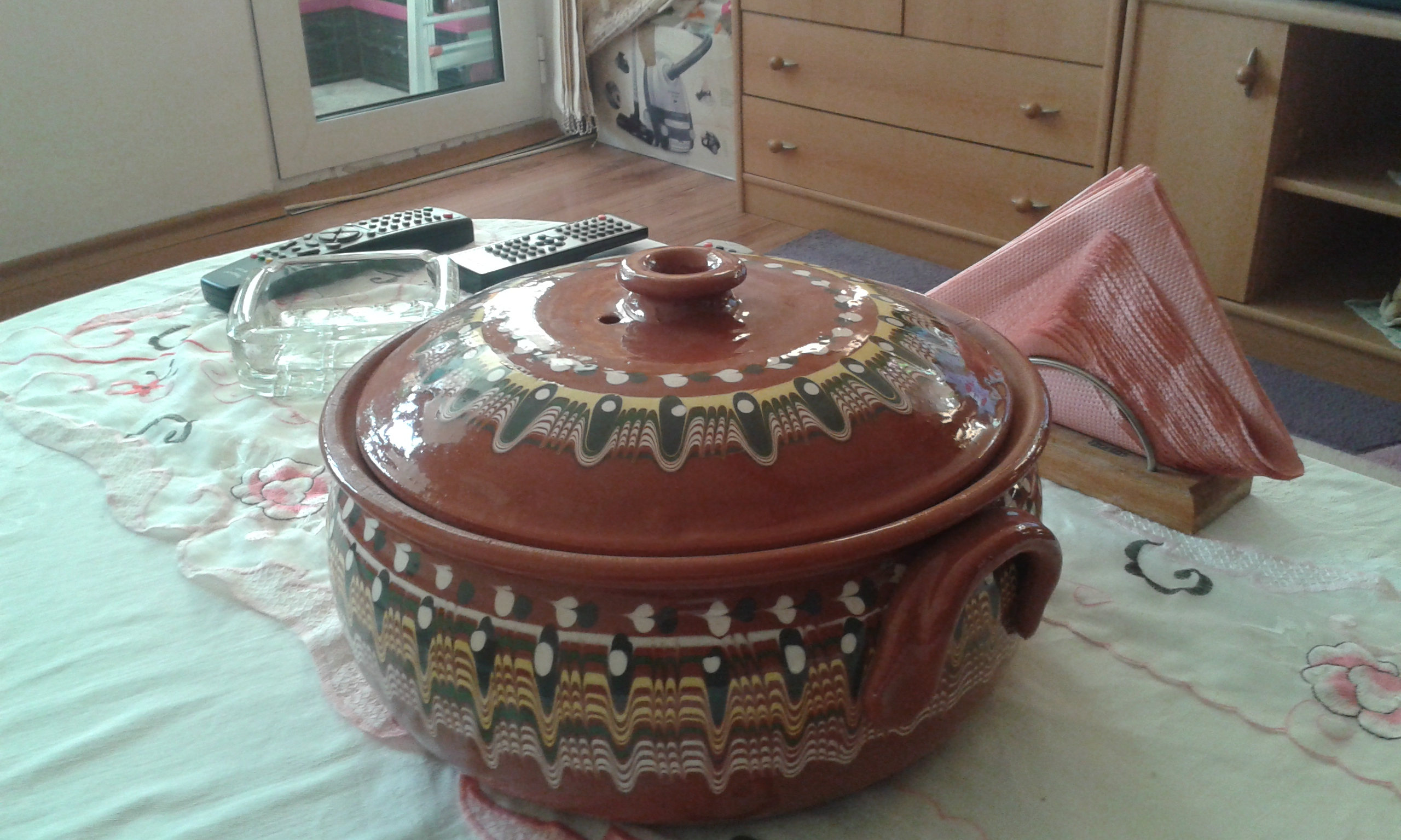 Γιουβέτσι βαθύ & στενό.